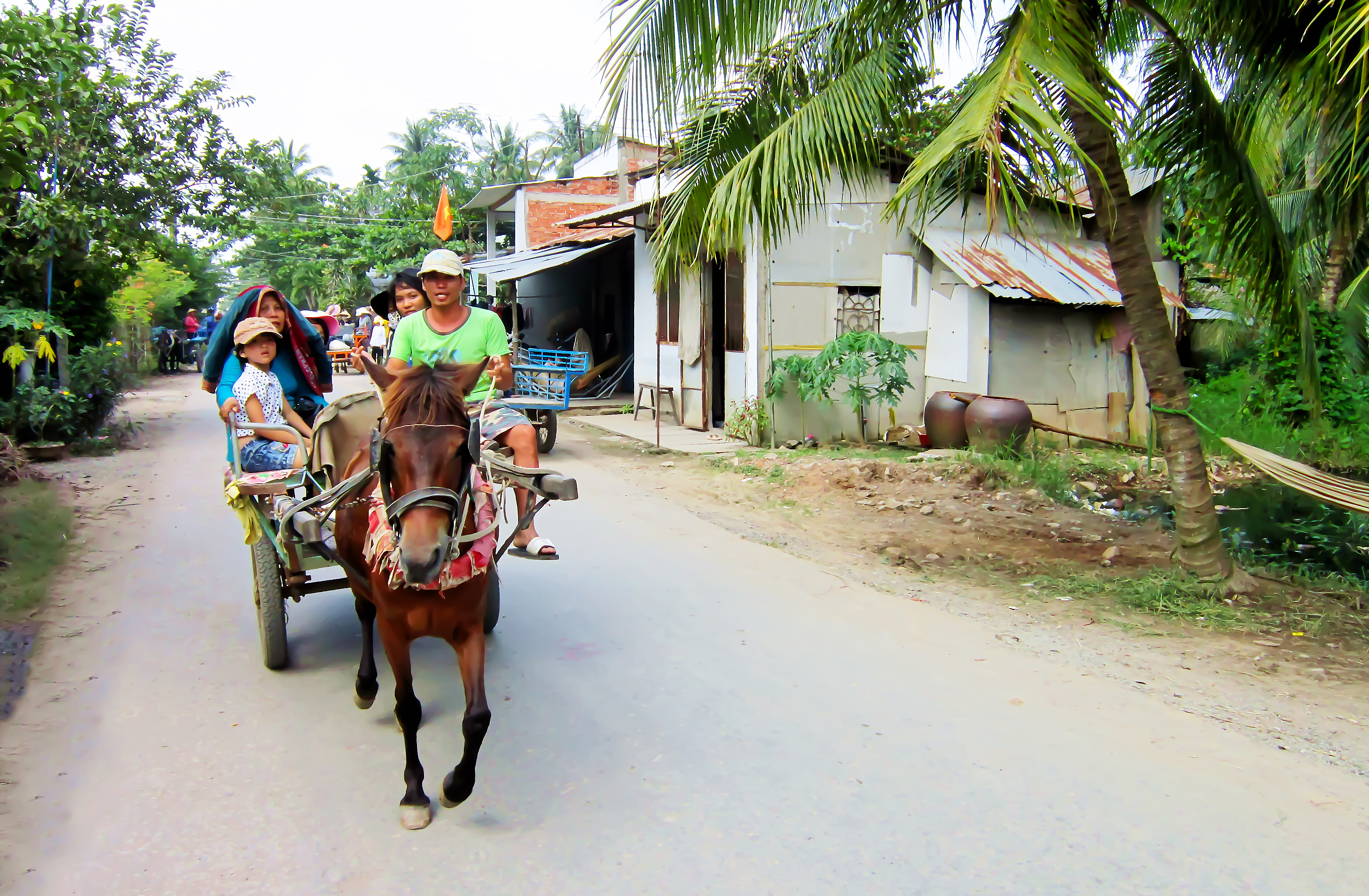 Đi xe ngựa tham quan cồn Lân trên sông Tiền, thuộc TP Mỹ Tho, Tiền Giang, Việt Nam.